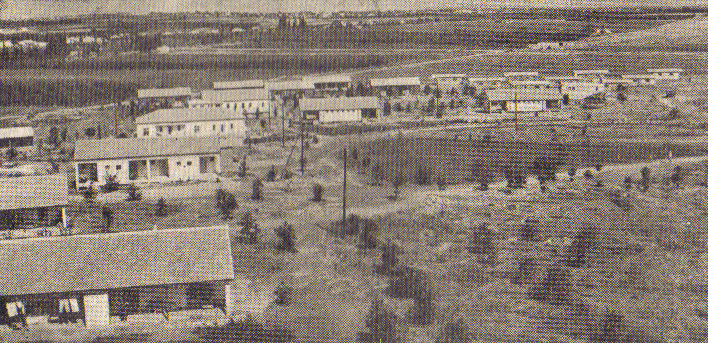 בארות יצחק ליד יהוד (שנות החמישים).